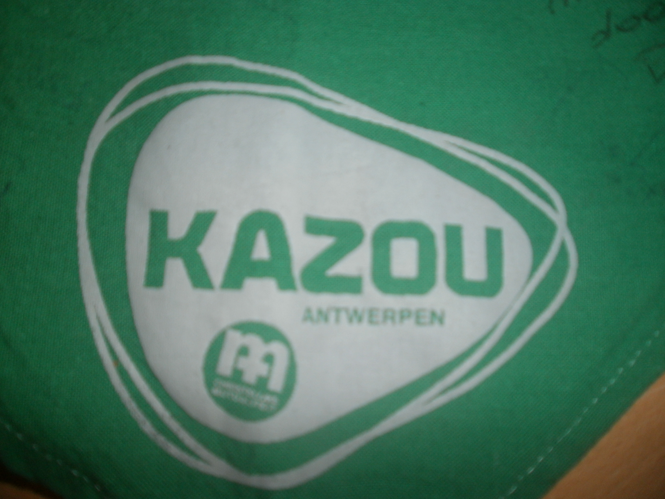 Kazou-logo